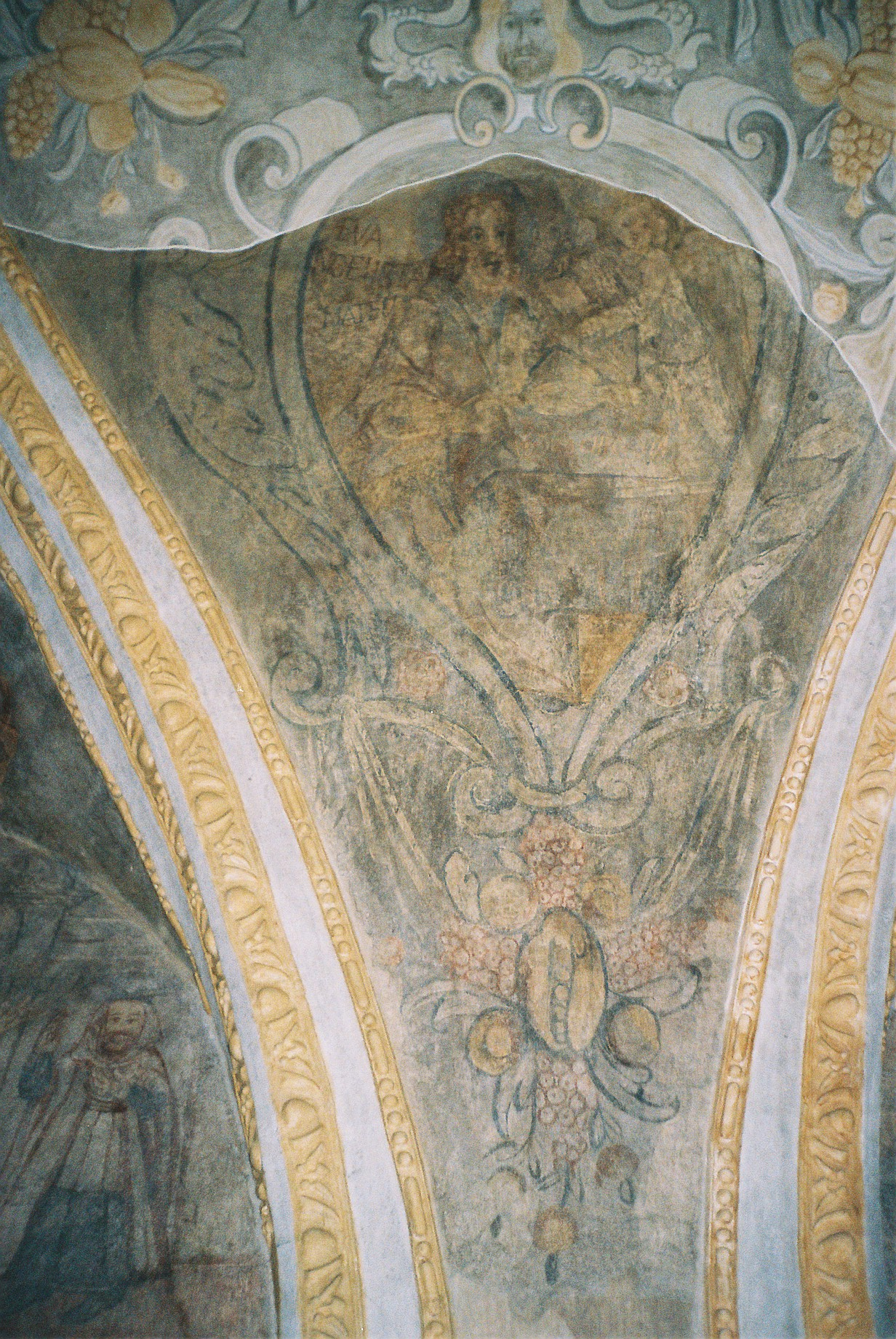 kamienica Gruszewiczów - wnętrze 9